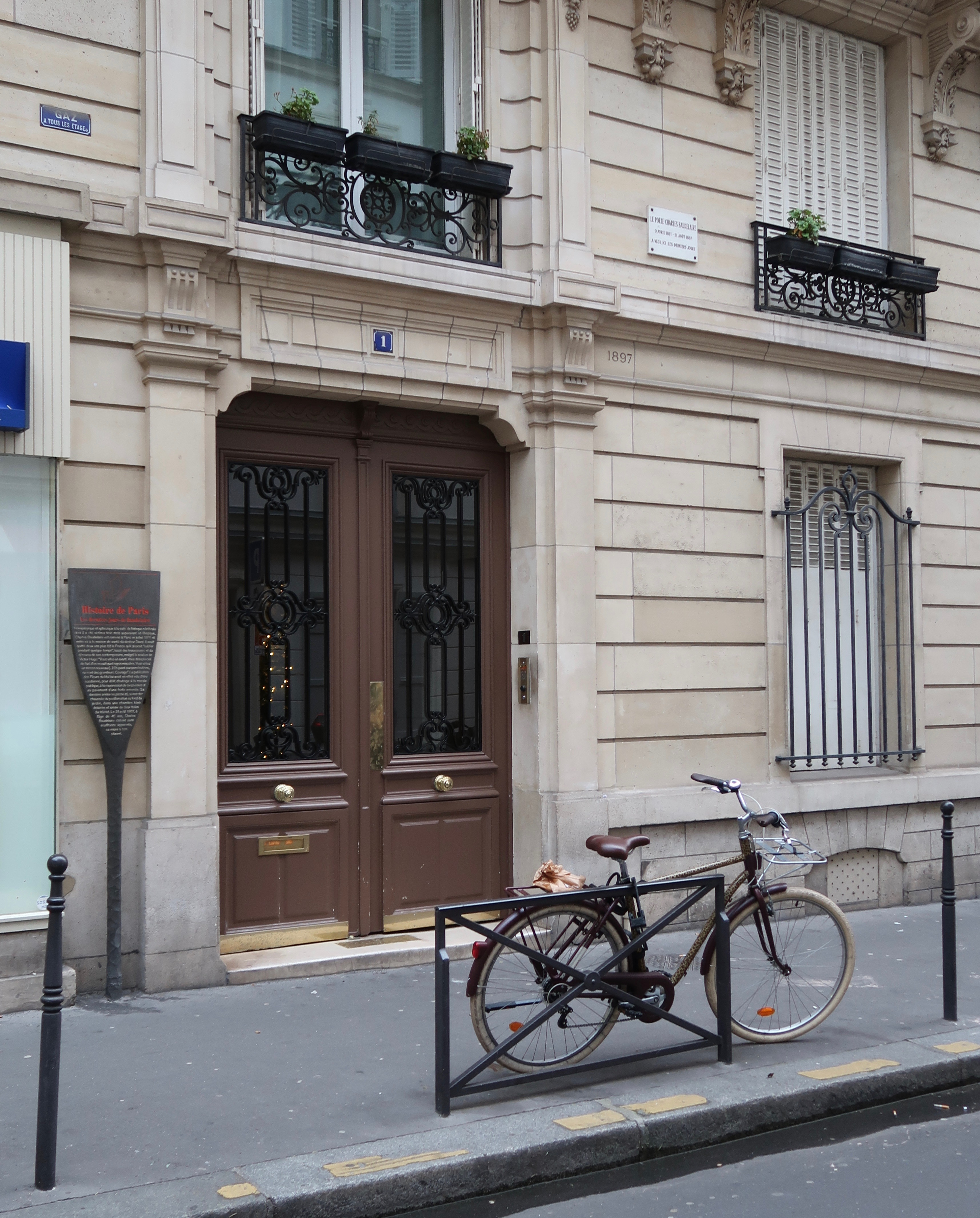 Panneau Histoire de Paris en hommage à Charles Baudelaire, 1 rue du Dôme (Paris, 16e).